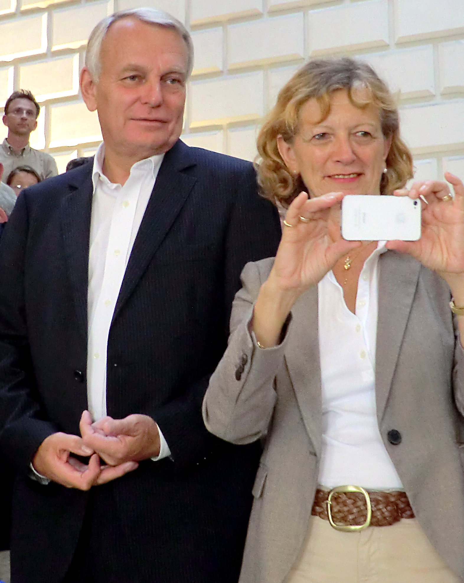 Jean-Marc Ayrault et son épouse Brigitte, au Musée des beaux-arts de Nantes, en septembre 2011.